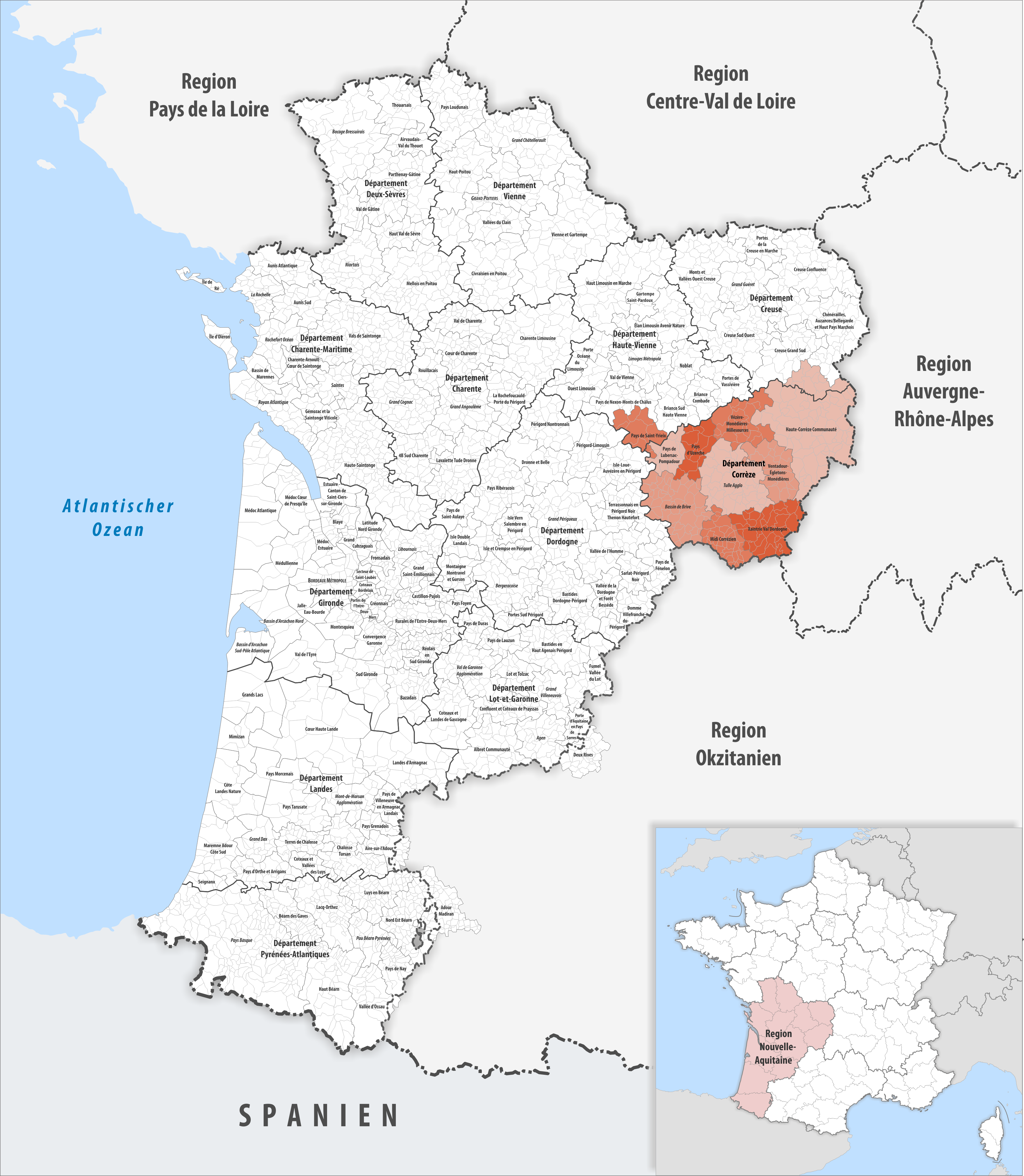 Gemeindeverbände im Département Corrèze